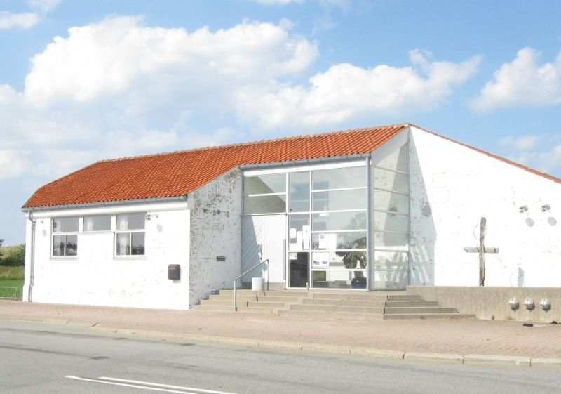 Kirche in Hanstholm am Centervej